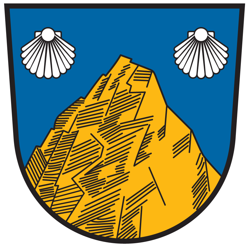 Wappen von Reichenfels